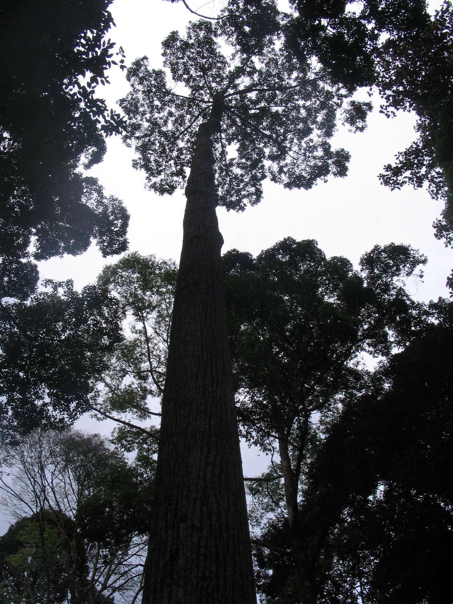 Shorea ovalis - Foret Research Institute of Malaysia - Kepong - Malaisie